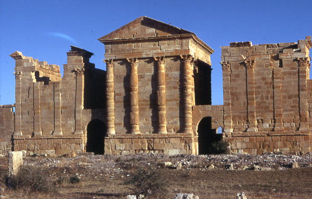 Ruines romaines de Sbeitla, Tunisie